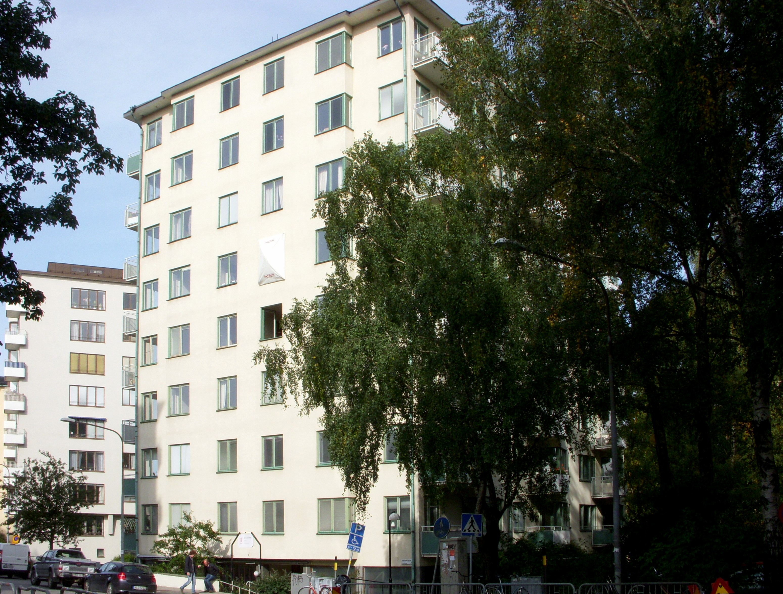 YK-huset på Östermalm, Stockholm